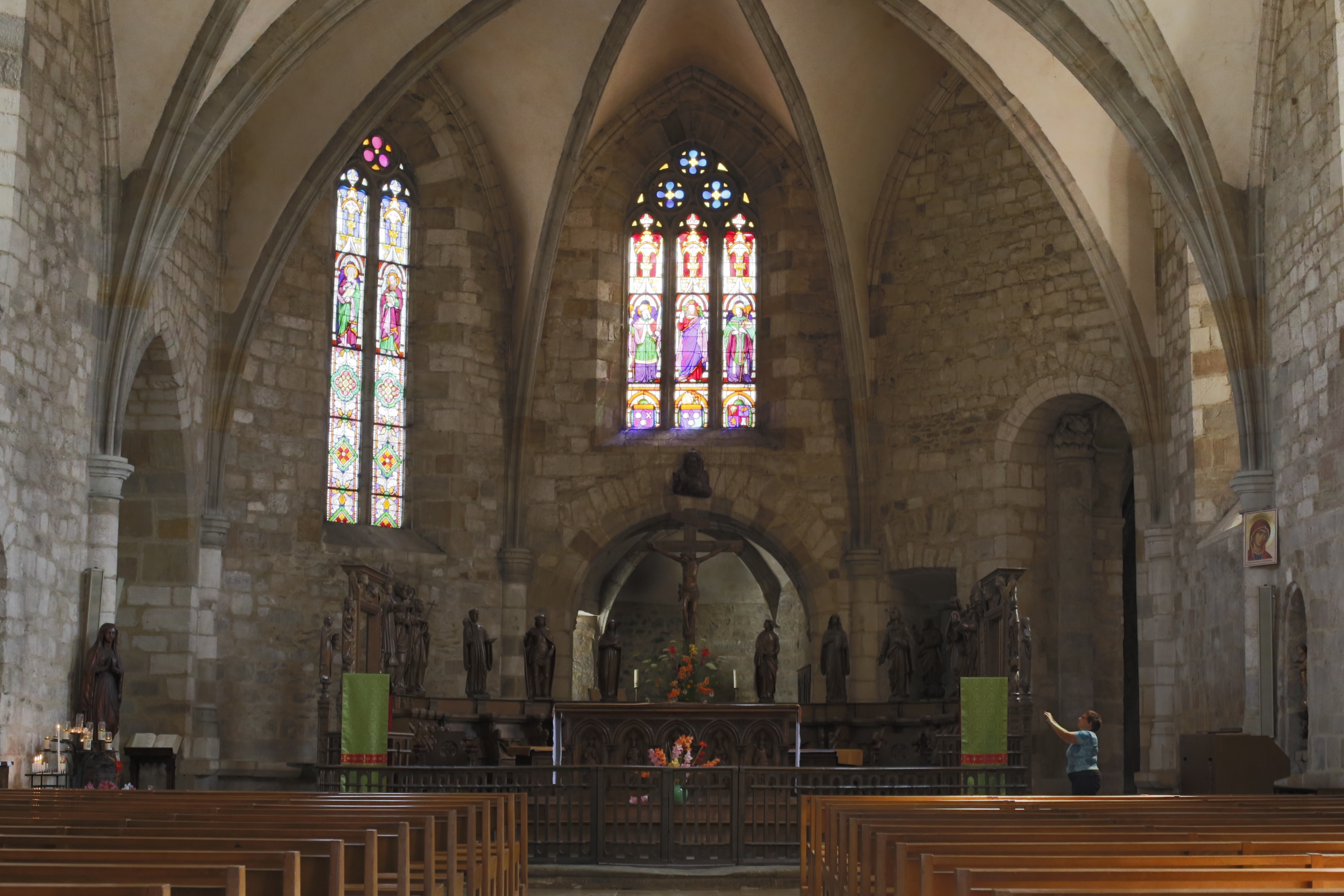 Église Saint-Césaire de Maurs : le chœur.